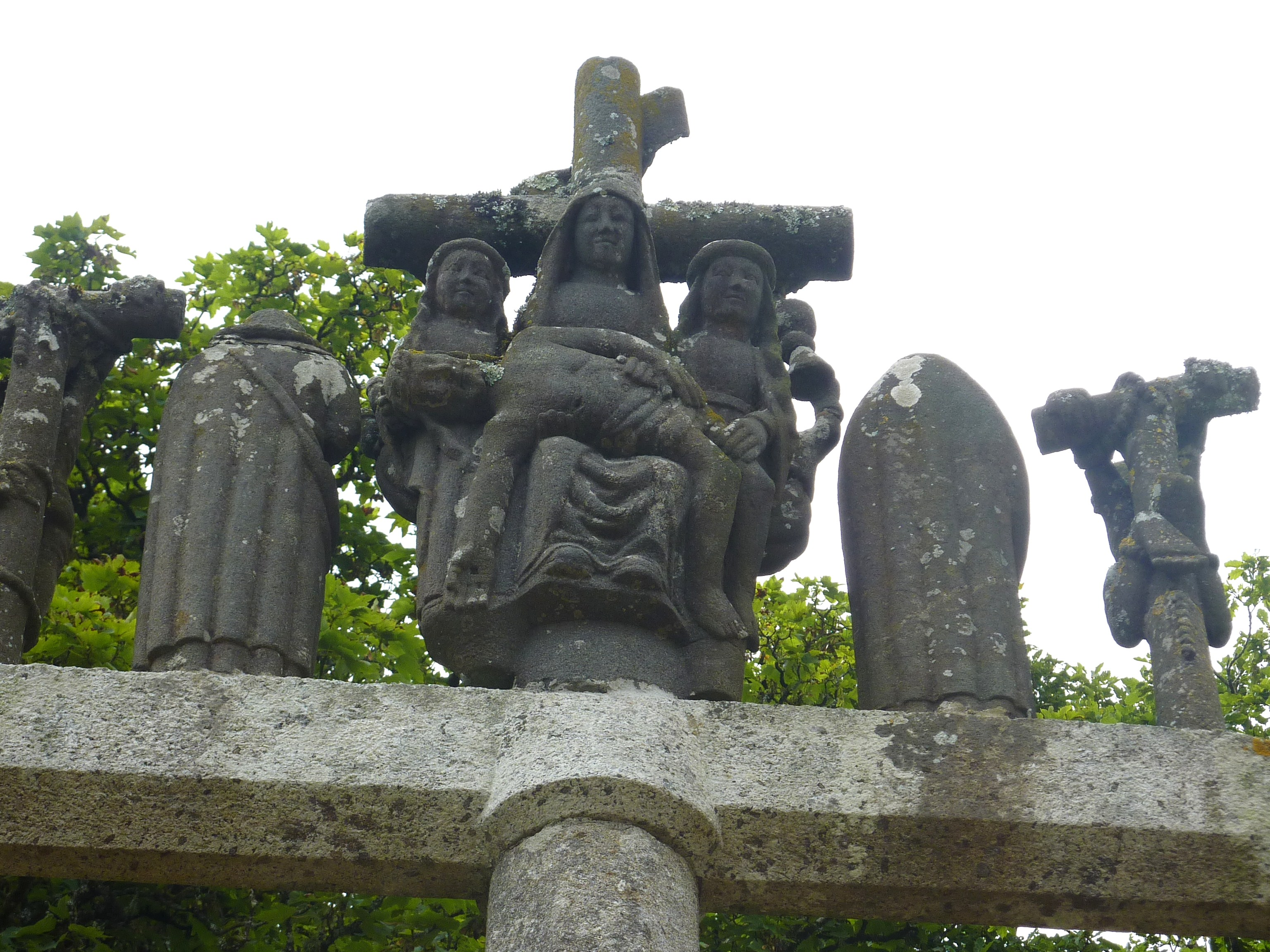 Locmaria-Berrien: le calvaire, côté nord